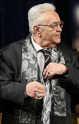 فضل الله توکل در اختتامیه پنجمین جشنواره همایون خرم - تالار وحدت تهران ۲۳ آذر ۱۳۹۷